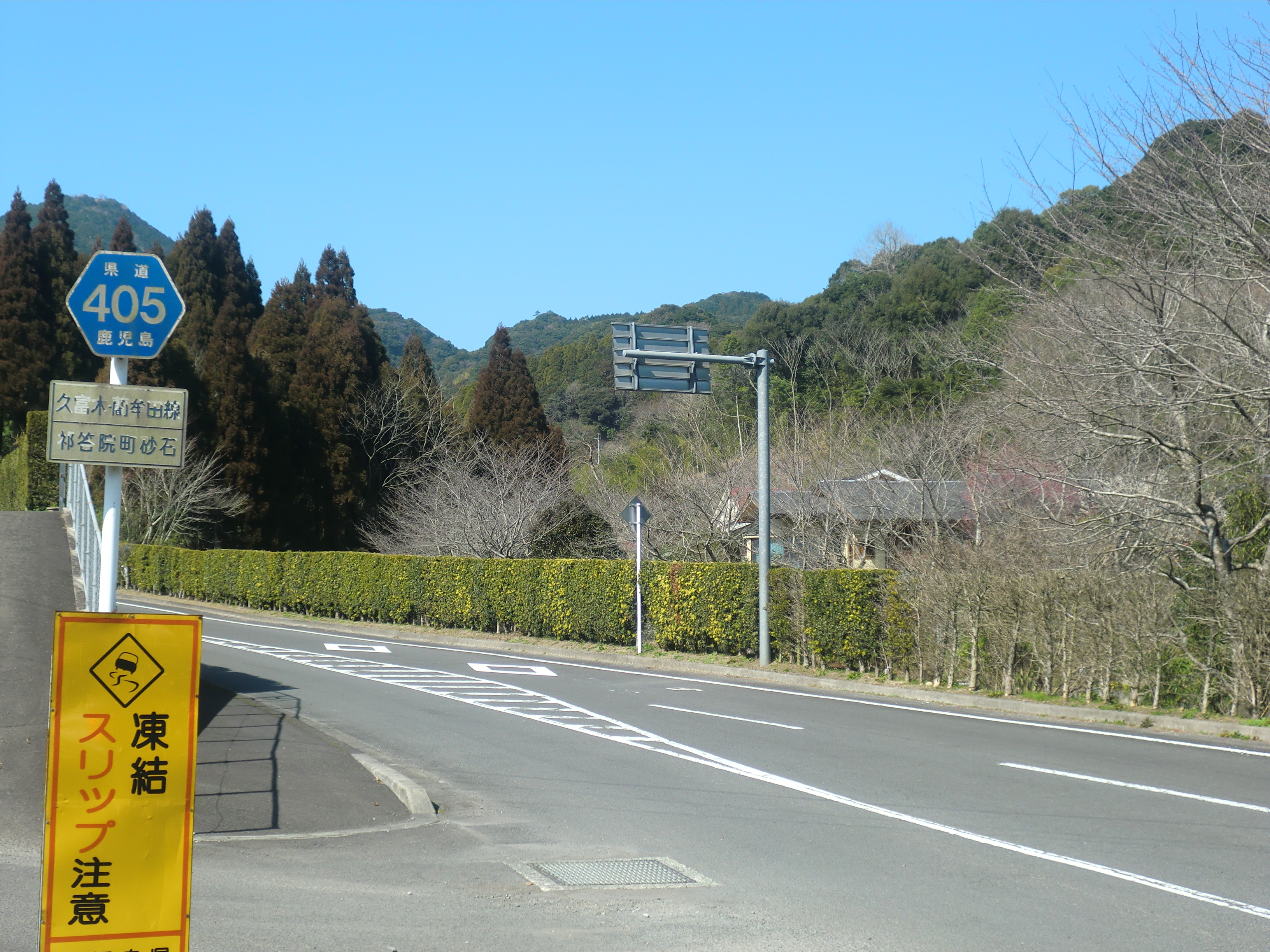 鹿児島県道405号久富木藺牟田線。薩摩川内市で撮影。